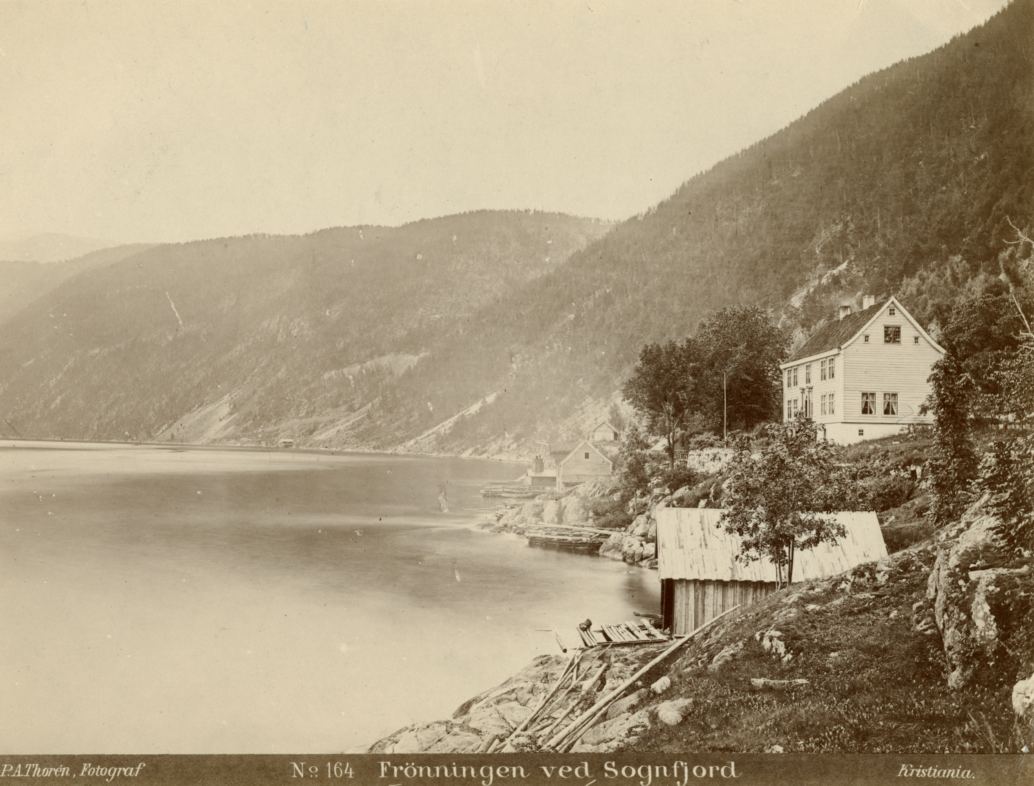 Frønningen i Sogndal, Vestland